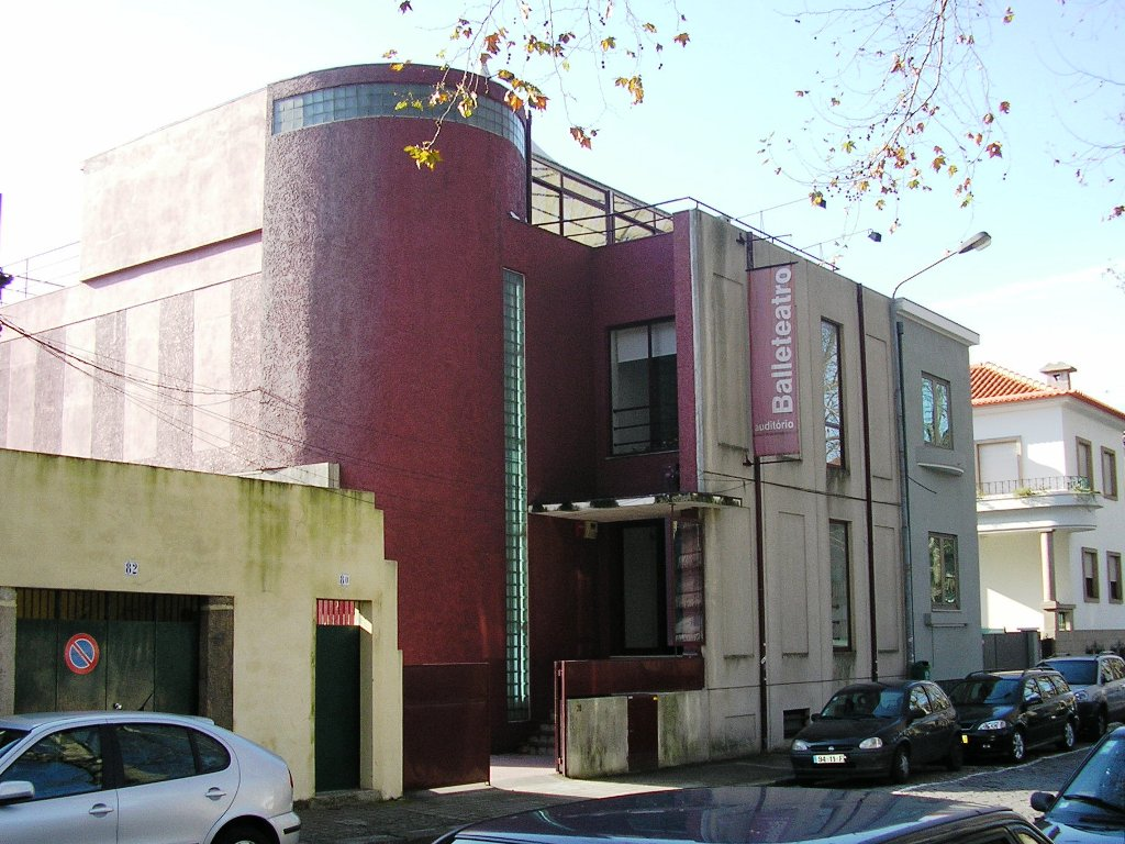 "Balleteatro" auditorium in Porto, Portugal. Author: Manuel de Sousa